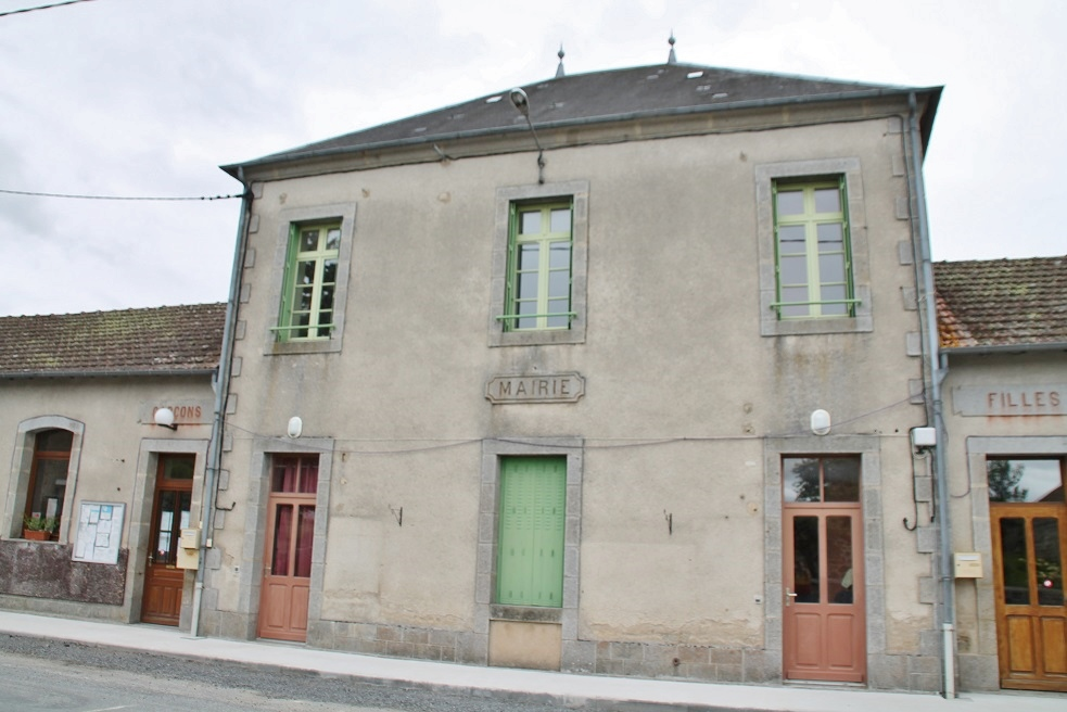 la Mairie